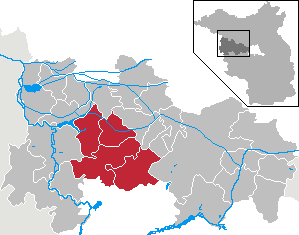 Amt Nennhausen in Brandenburg (Country) - District Havelland